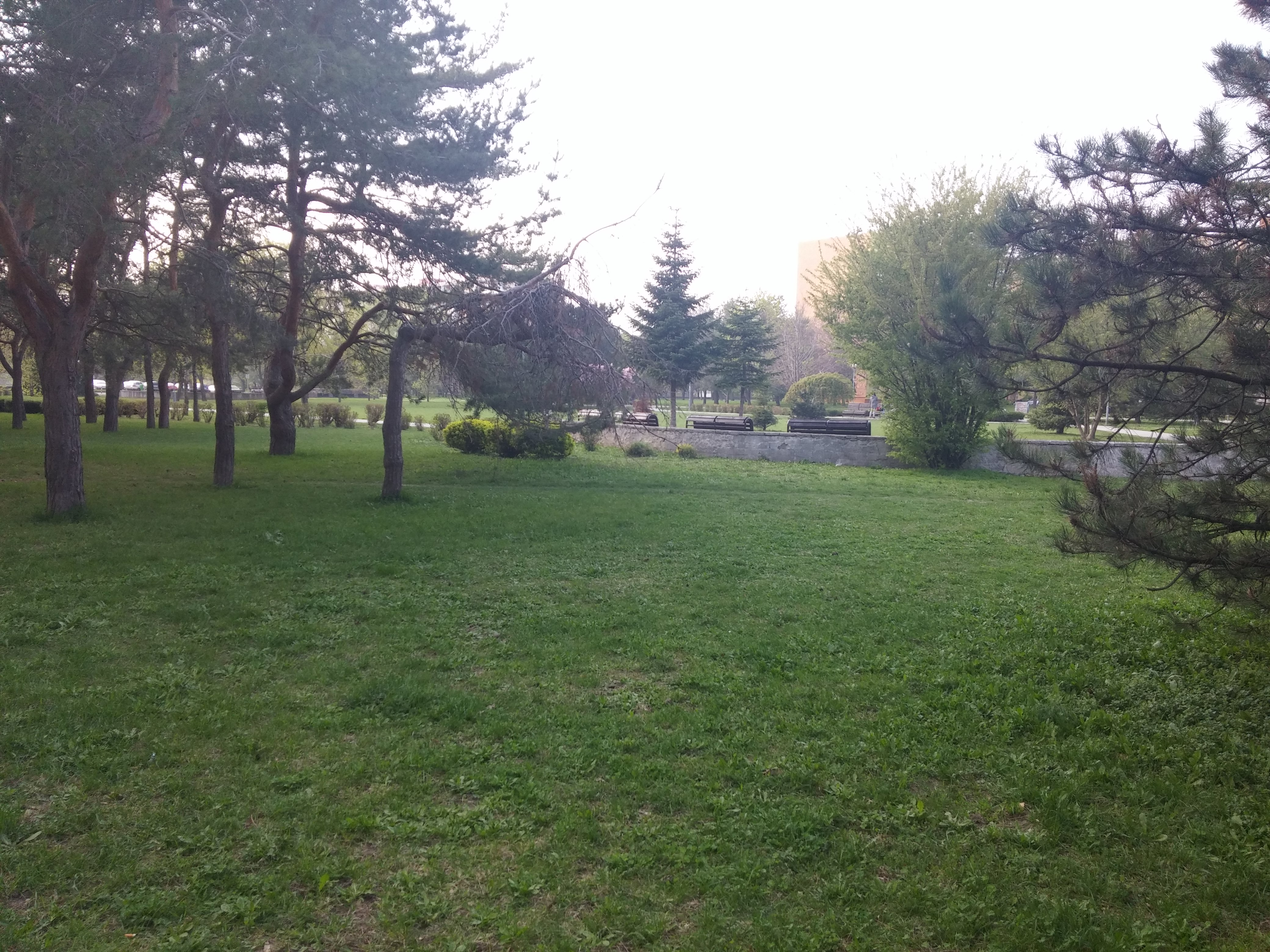 Park Ostredky, Ostredková, Ružinov, Bratislava